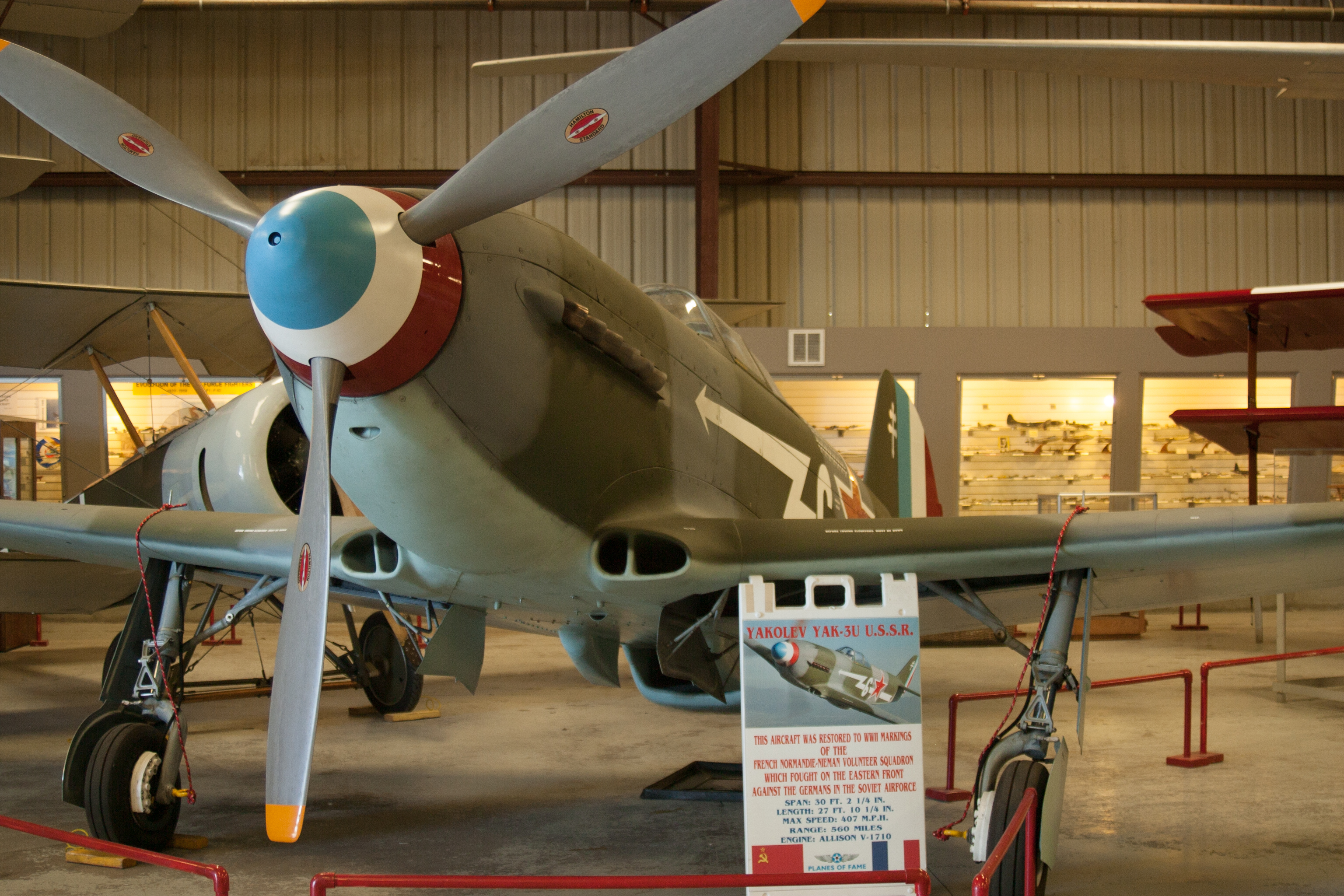 Yakovlev Yak-3U